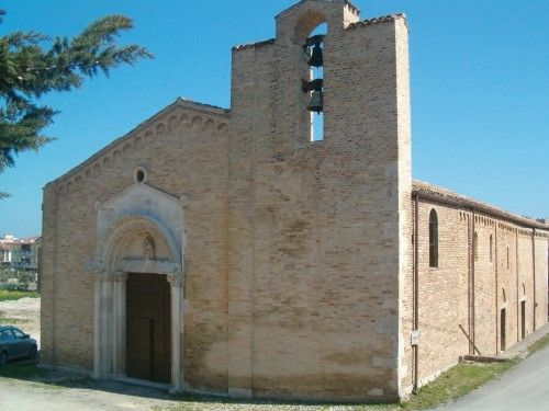 Chiesa di Santa Maria a mare di Giulianova in provincia di Teramo, esterno giorno. Edificio religioso medioevale classificato come monumento nazionale italiano.